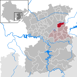 Moßbach in Thuringia - Saale-Orla-Kreis